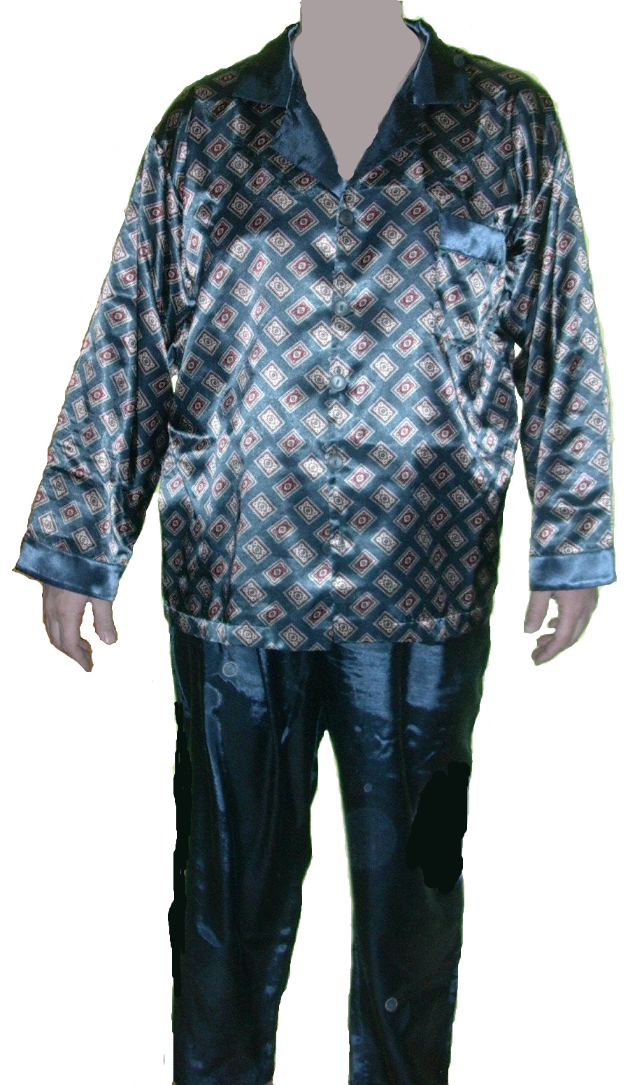 skirt - men's pyjamas